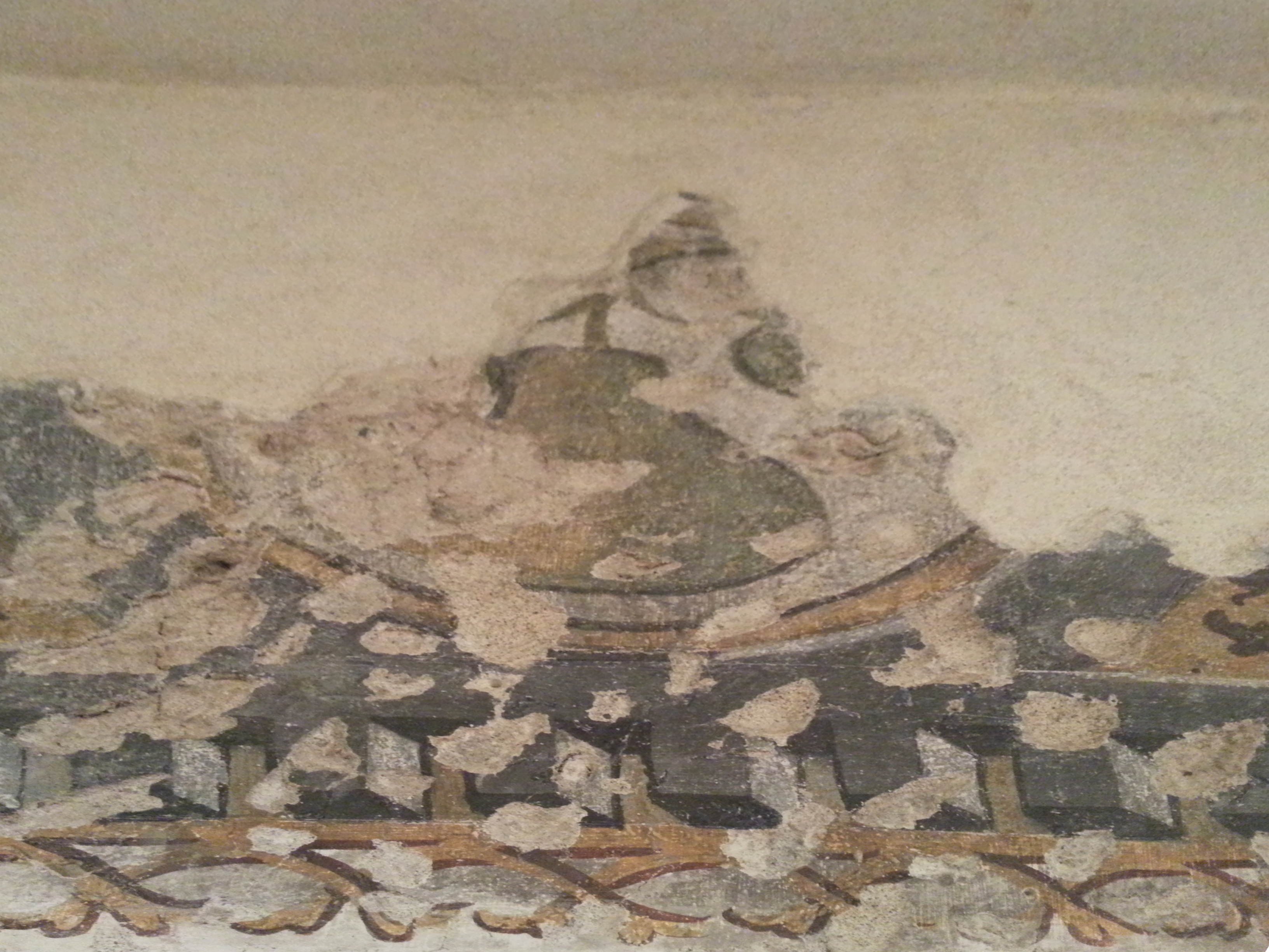 Stemma Ginami, nella Sala delle armi del Palazzo Milesi di Gromo